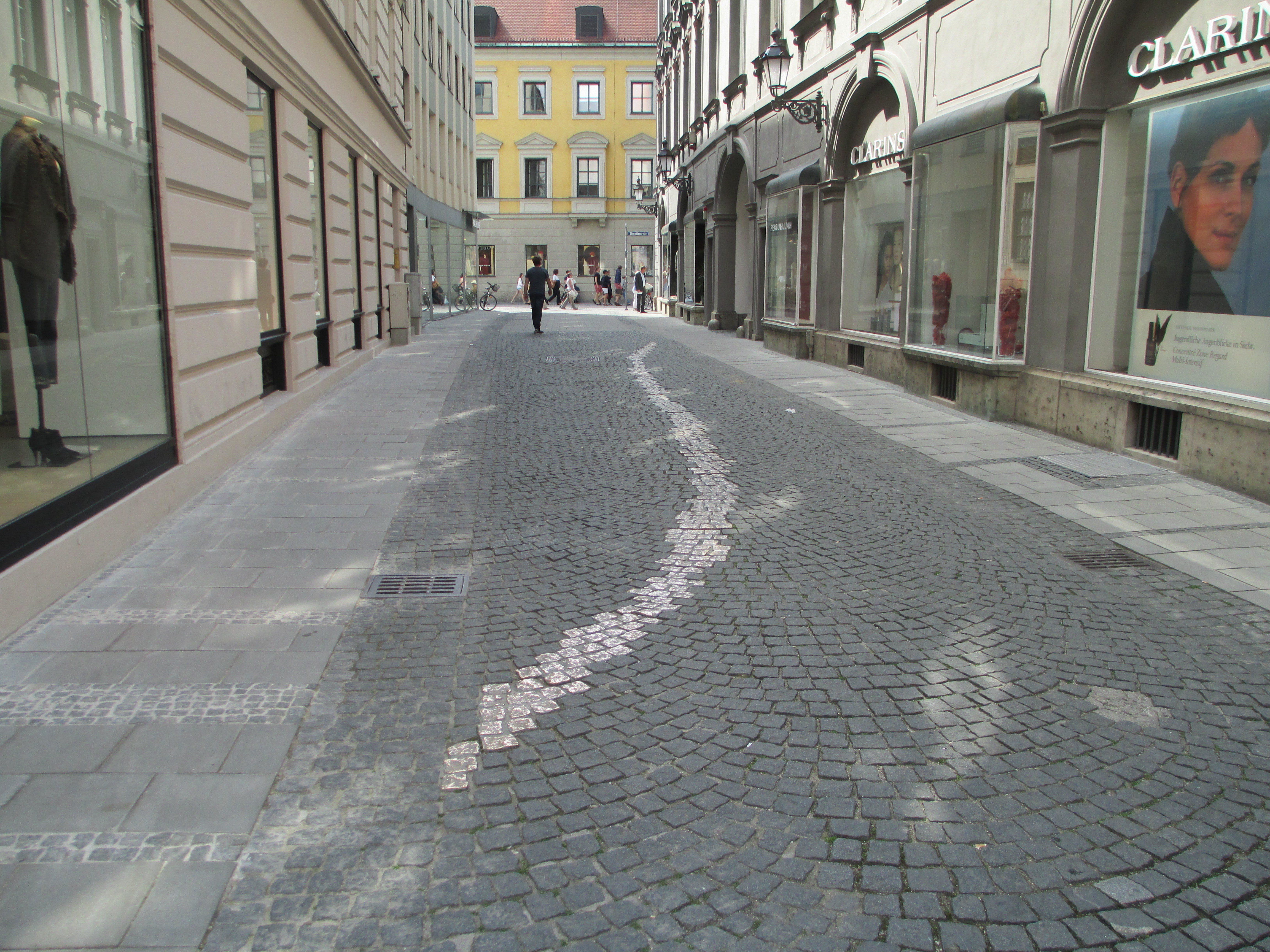 פס הזהב בסמטה ליד פלדהרנהלה לציון אלה שסירבו לעבור דרך אנדרטת הנאצים בפלדהרנהלה ולהצדיע שם במועל יד